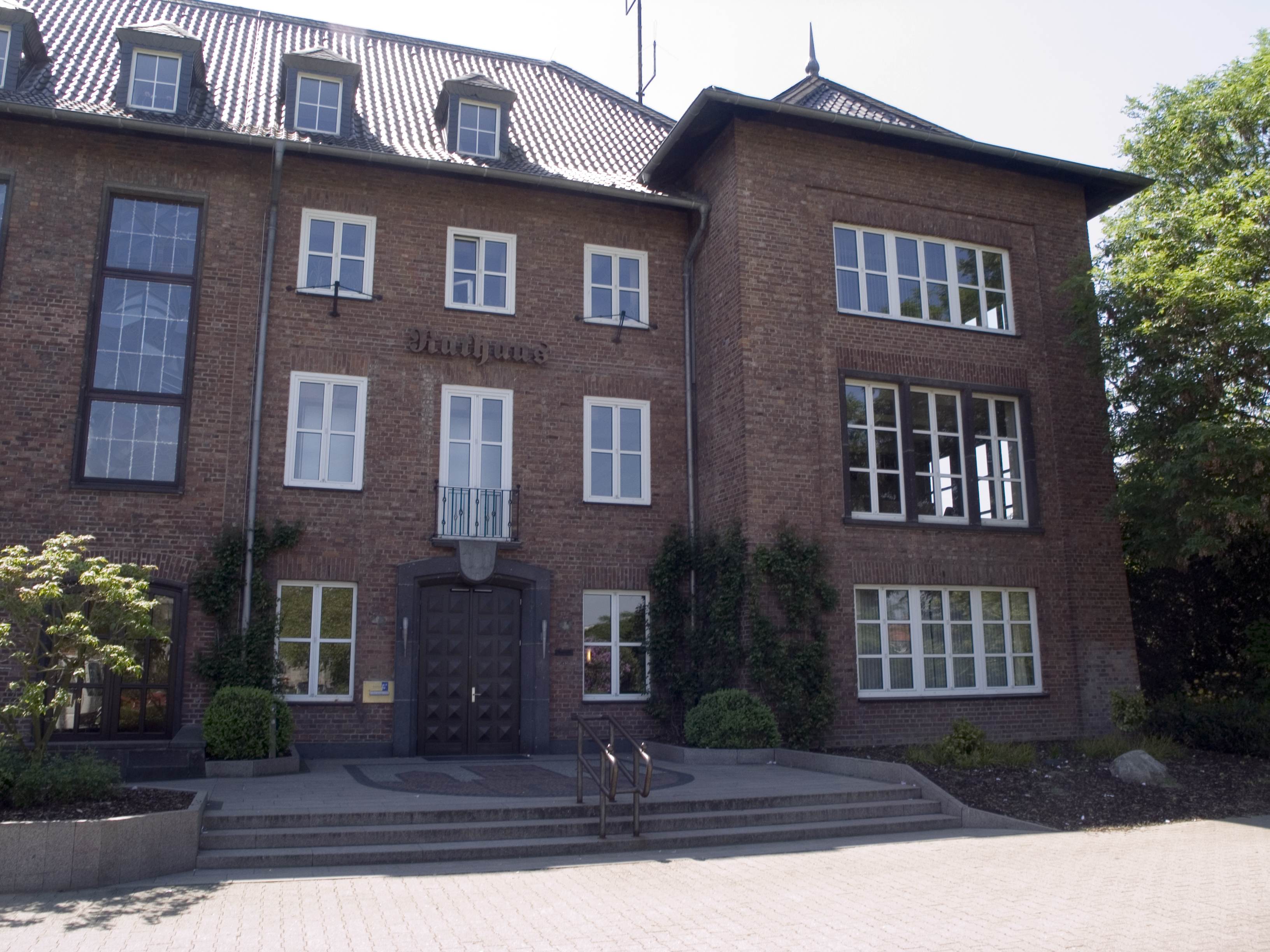 Северный Рейн-Вестфалия, Динслакен - Замок Динслакен (Ратуша)